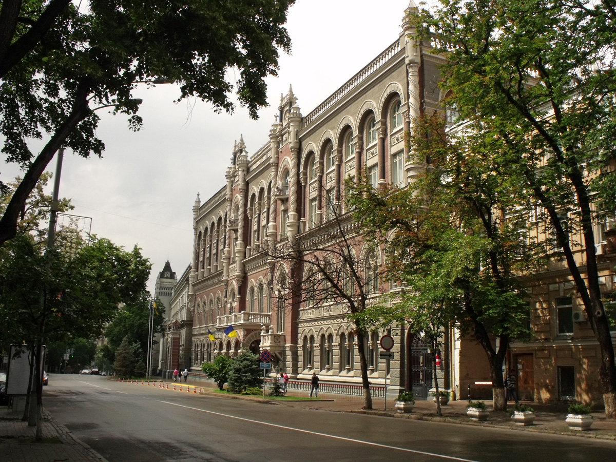 Будинок Київської контори Державного банку, якою на початку XX ст. управляв Г. О. Афанасьєв, історик, громадський діяч; на місці якого стояв житловий будинок, де у 1822–1825 роках відбувалися таємні збори декабристів, Київ, Інститутська вул., 9-а